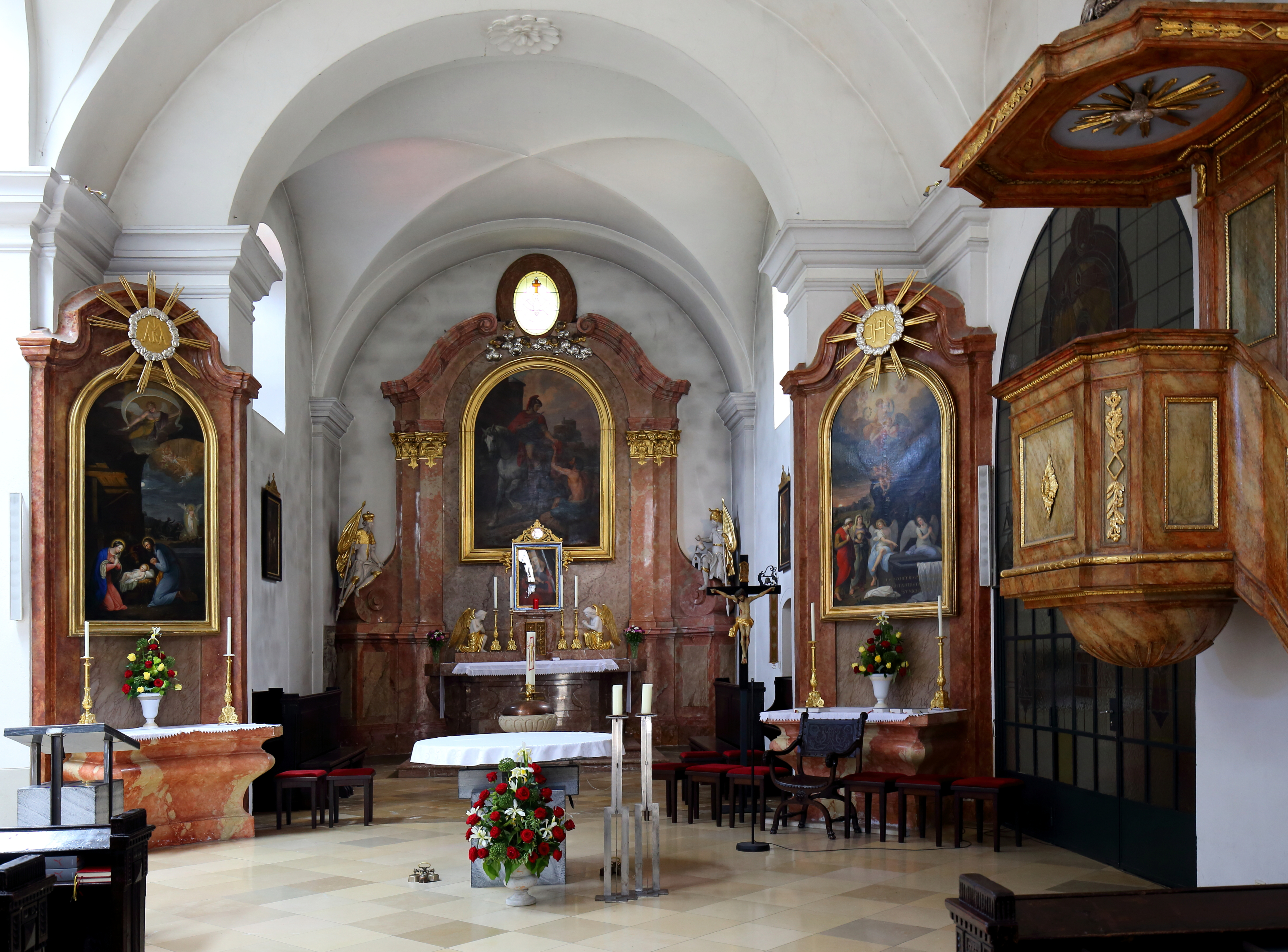 Hochaltar und Seitenaltäre der Pfarrkirche Aspern im 22. Wiener Gemeindebezirk Donaustadt.